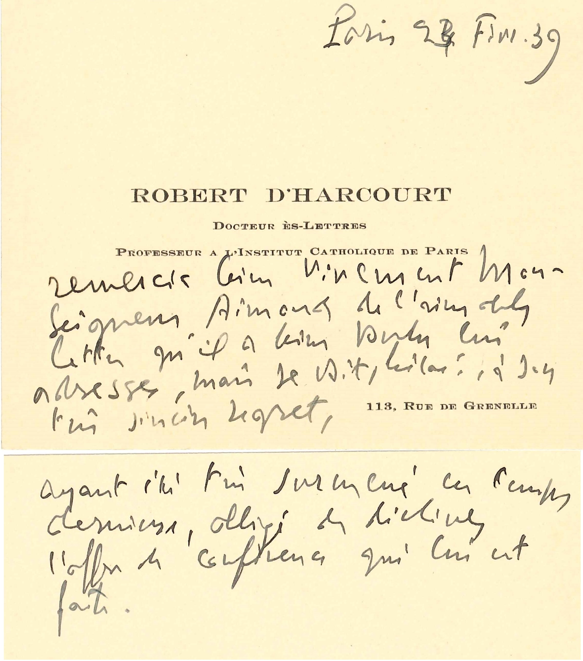 Carte de visite manuscrite de Robert d’Harcourt (1881–1965), intellectuel catholique français. Cette carte datée du 23 février 1939 fut adressée à Monseigneur Charles Aimond. Source : Archives Jean Grosdidier de Matons (1926–2017), sans doute par sa nièce Jeanne Buitge qui accompagna Mgr Aimond au cours de sa vie.